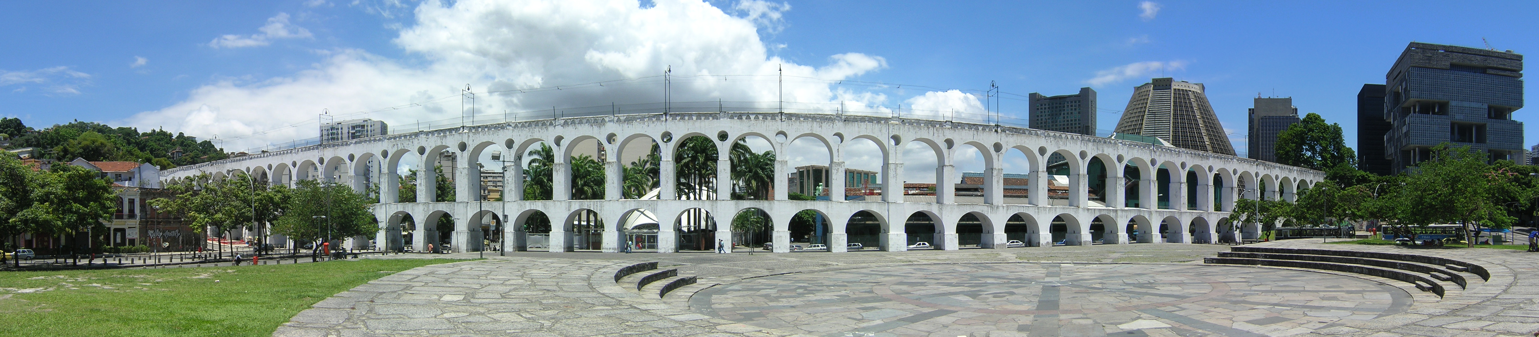 Tram viaduct in Rio de Janeiro (Arcos da Lapa, Bonde de Santa Tereza).